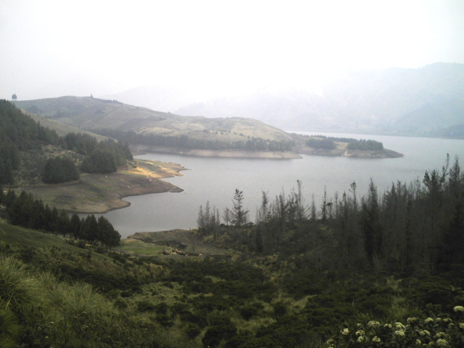 Laguna Corani (Represa) Chapare Bolivia